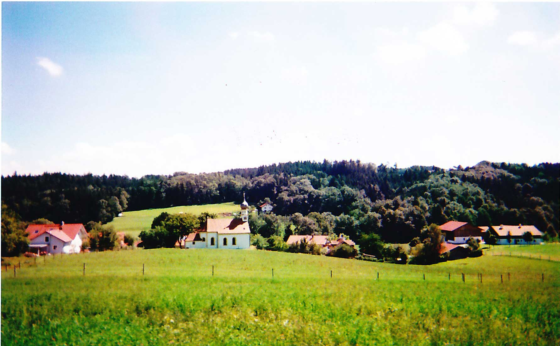 Hofgiebing von Norden aus gesehen